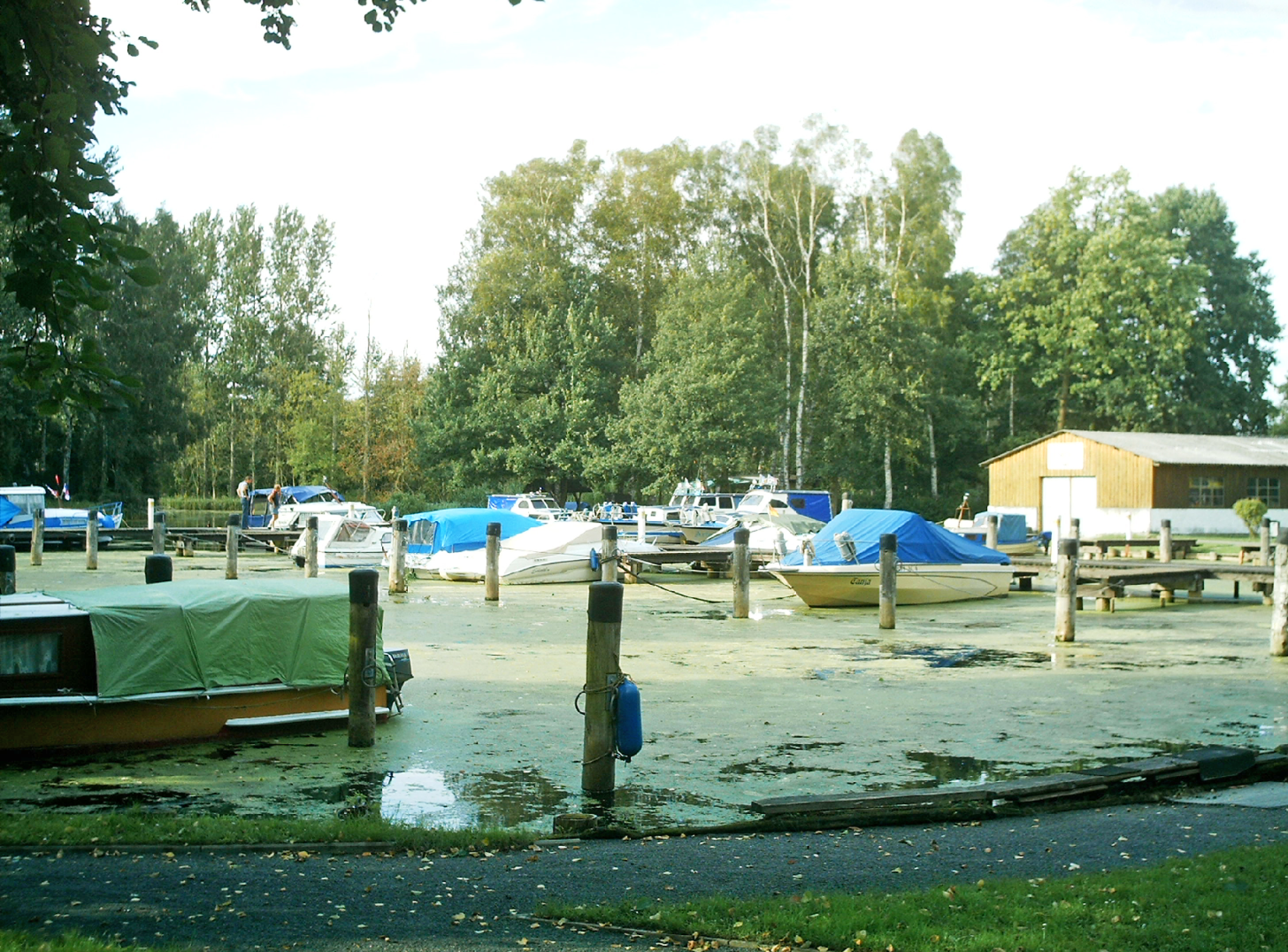 der Rastplatz befindet sich in einem Seitenarm der Randow nahe Eggesin